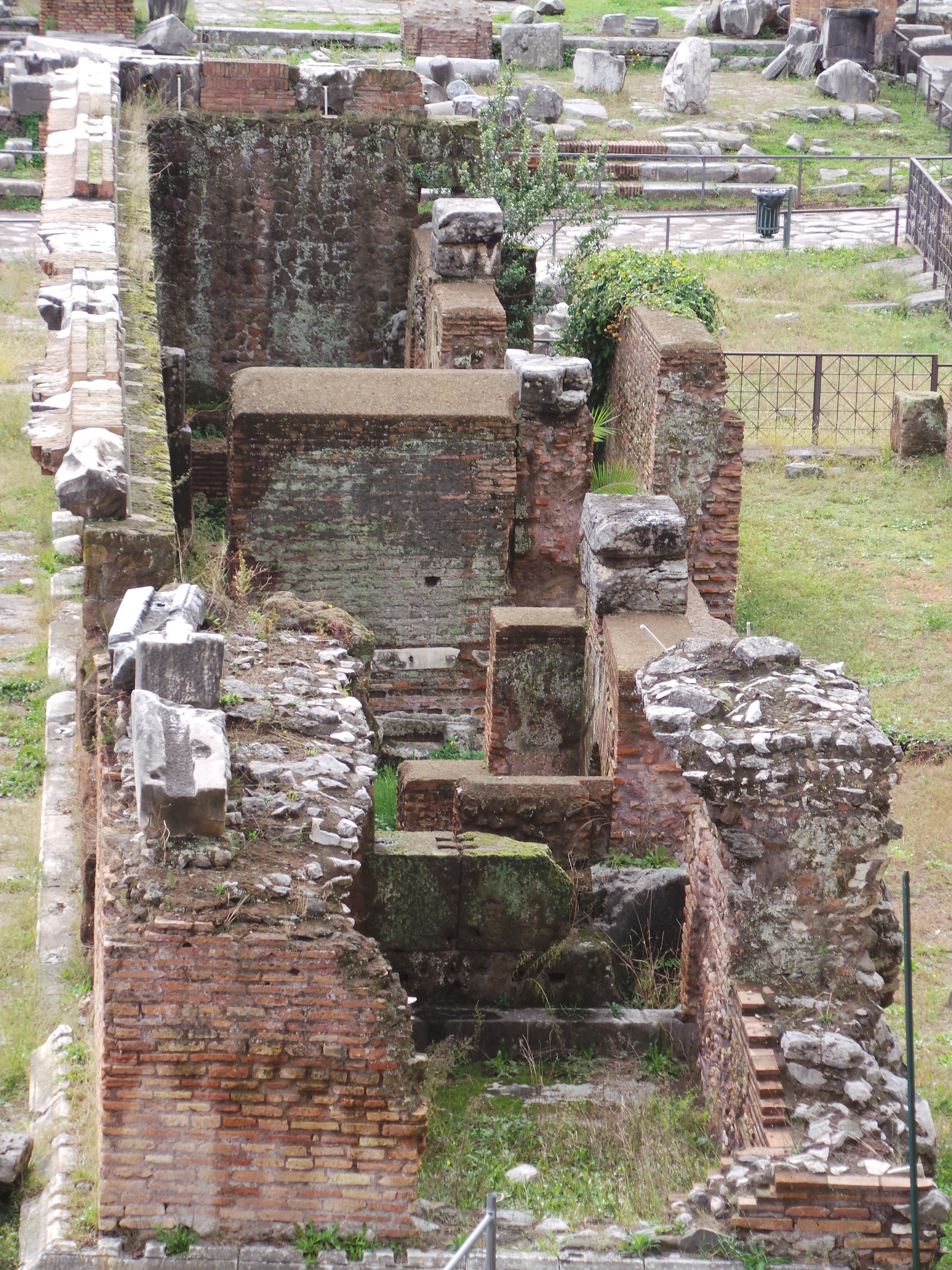 Corpus der Rostra (2014)